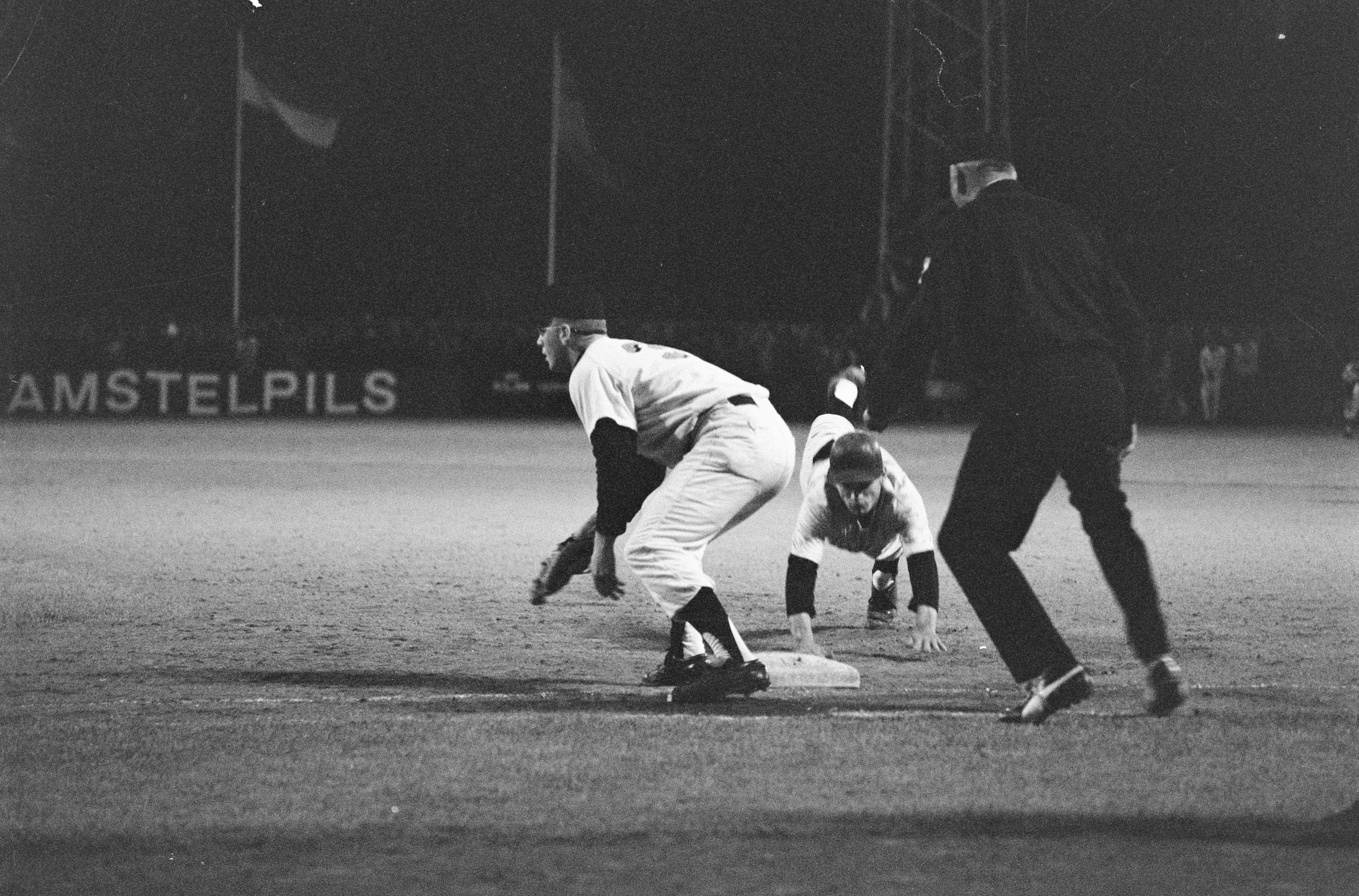 Collectie / Archief : Fotocollectie Anefo Reportage / Serie : [ onbekend ] Beschrijving : Honkbal Nederland tegen California Stags , Arnoud Blom (Nederland) weet op tijd eerste honk te komen Datum : 12 augustus 1966 Locatie : Haarlem Trefwoorden : honkbal, sport Persoonsnaam : Blom Arnoud, California Stags Fotograaf : Kroon, Ron / Anefo Auteursrechthebbende : Nationaal Archief Materiaalsoort : Negatief (zwart/wit) Nummer archiefinventaris : bekijk toegang 2.24.01.05 Bestanddeelnummer : 919-4456